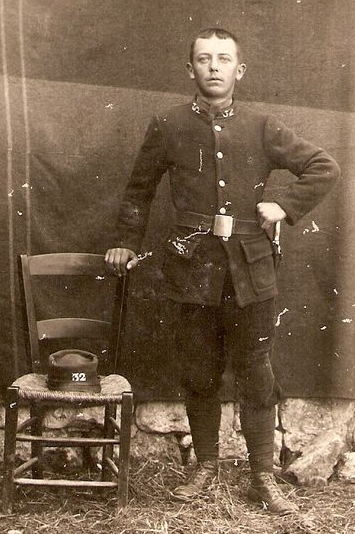 Poilu de la guerre de 1914-18 non identifié, appartenant au 32eme régiment d'infanterie (France)